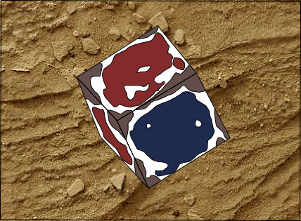 Dé de Watto